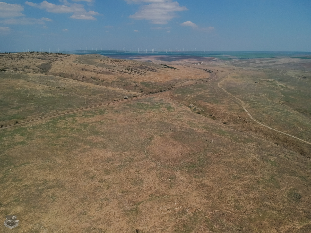 Așezarea urbană Ester 01